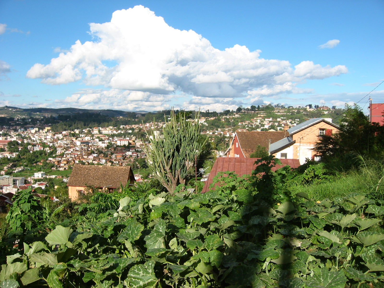 Antananarivo/Tana